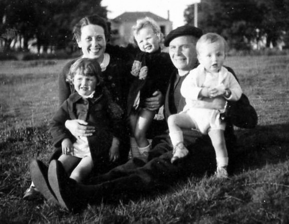 Eugène Hénaff en permission retrouve sa famille, au printemps 1940, sa femme Germaine et ses trois enfants : Yvette, Jacqueline et Michel.